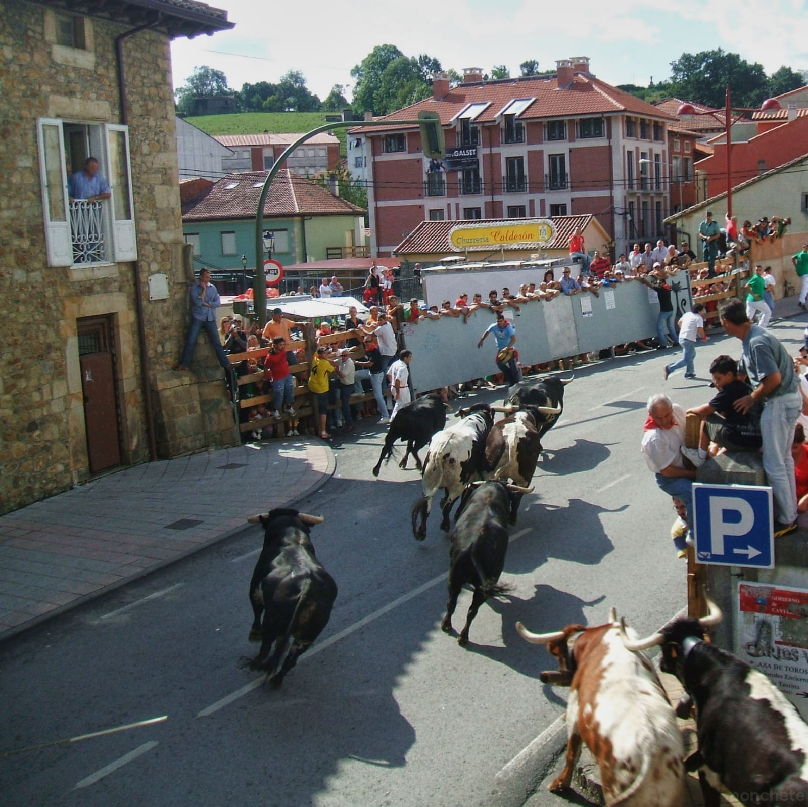 Encierro realizado en la localidad de Ampuero (Cantabria) con motivo de la festividad de La Virgen Niña